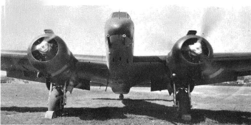 Aereo Savoia Marchetti SM.89